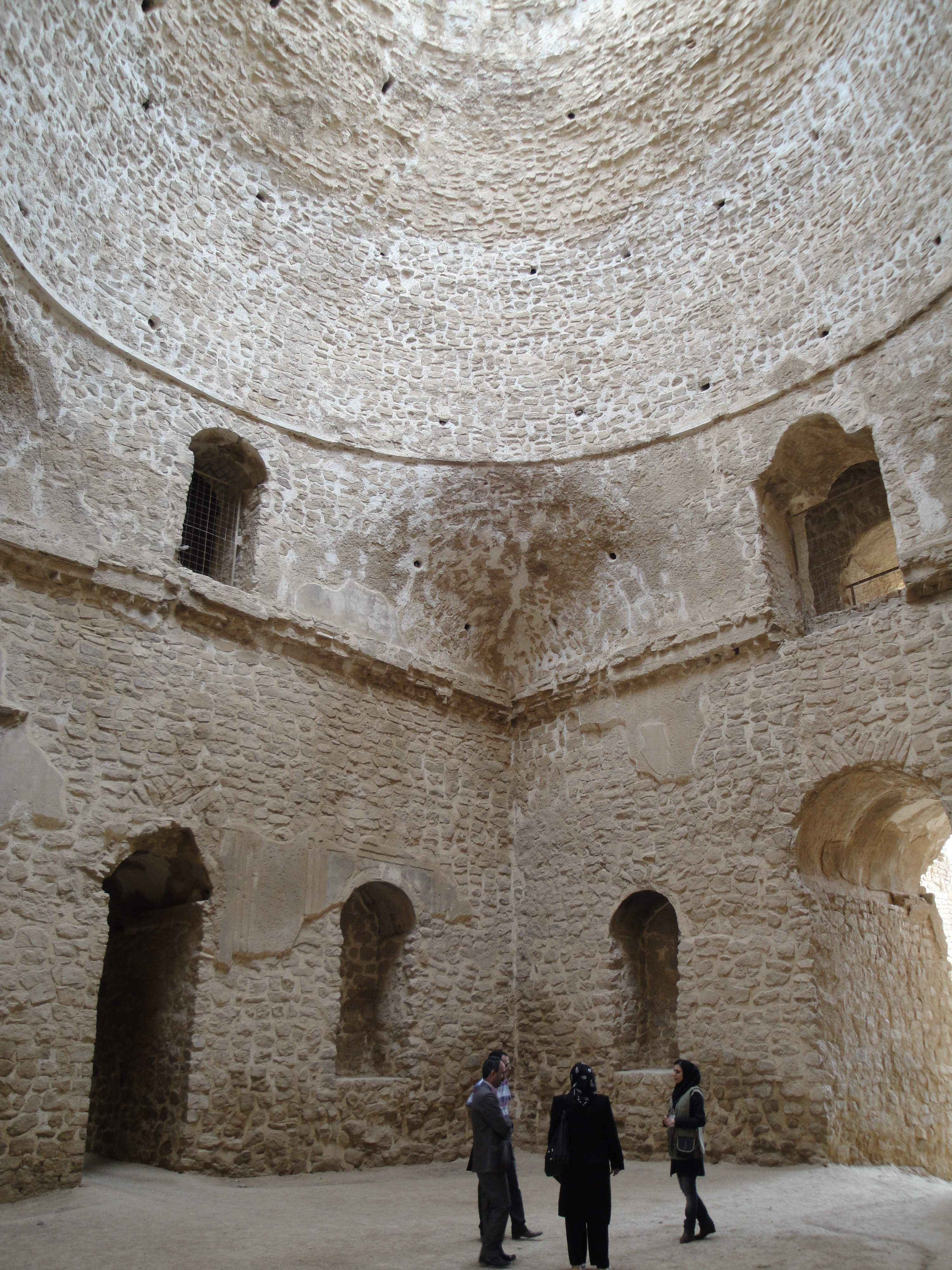 داخل و زیر یکی از گنبدهای کاخ اردشیر بابکان